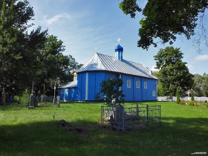 Гарадзец. Свята-Ушэсцеўская царква